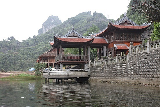 phơng cảnh khu du lịch Tràng An ở Ninh Bình